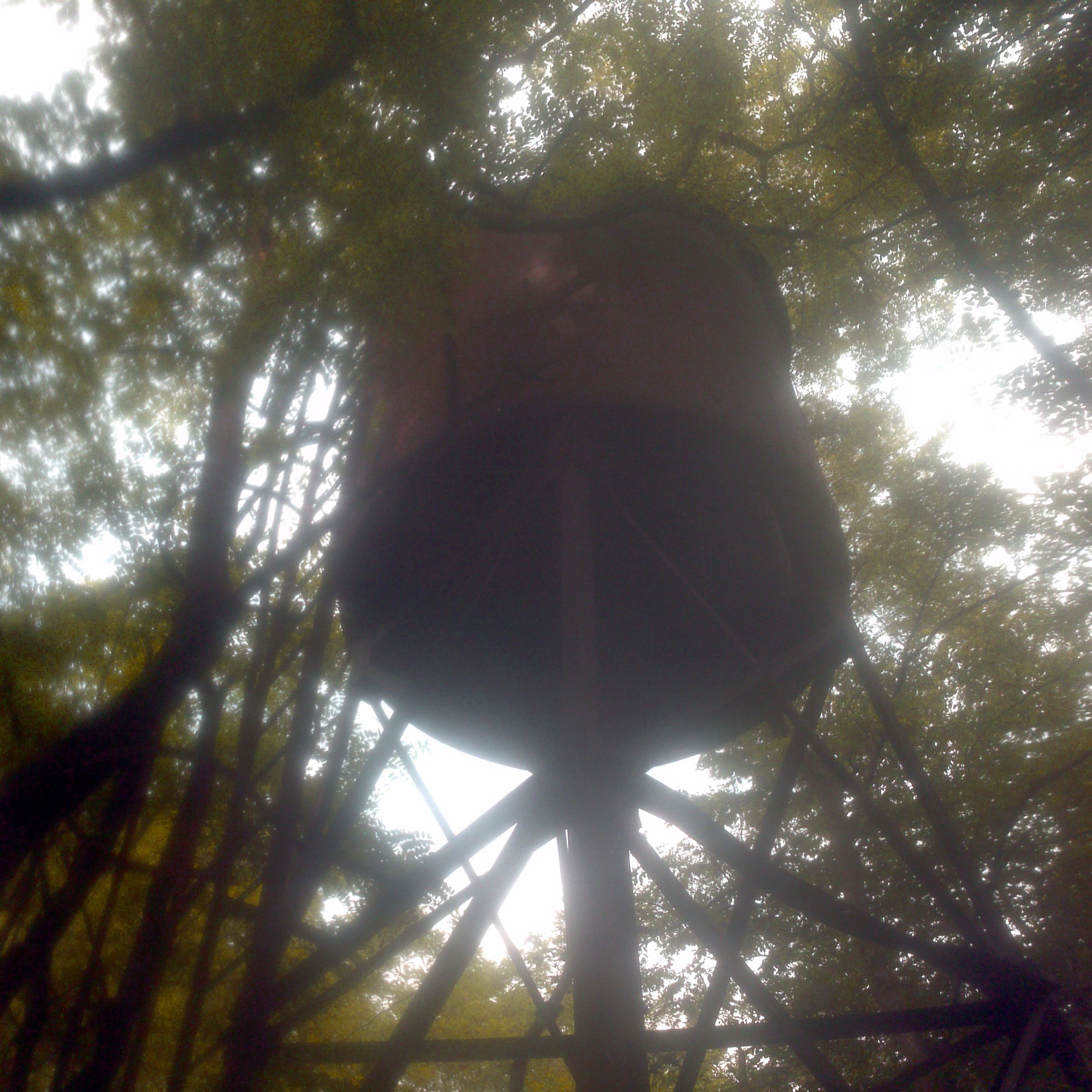 Wassertank im Depot bei Benestroff. Heute ist das Gelände völlig renaturiert.